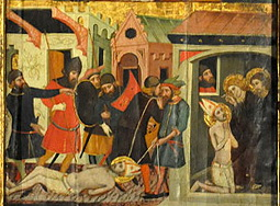 Retaule de Sant Marc i Sant Anià, obra d'Arnau Bassa (1346). Actualment a la Seu de Manresa. Taula del martiri de Sant Marc, al pis central del carrer dret